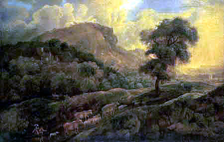 Hermann van Swanevelt (* um 1600; † 1655) oder Umgebung zugeschrieben: Herdenzug in der römischen Campagna